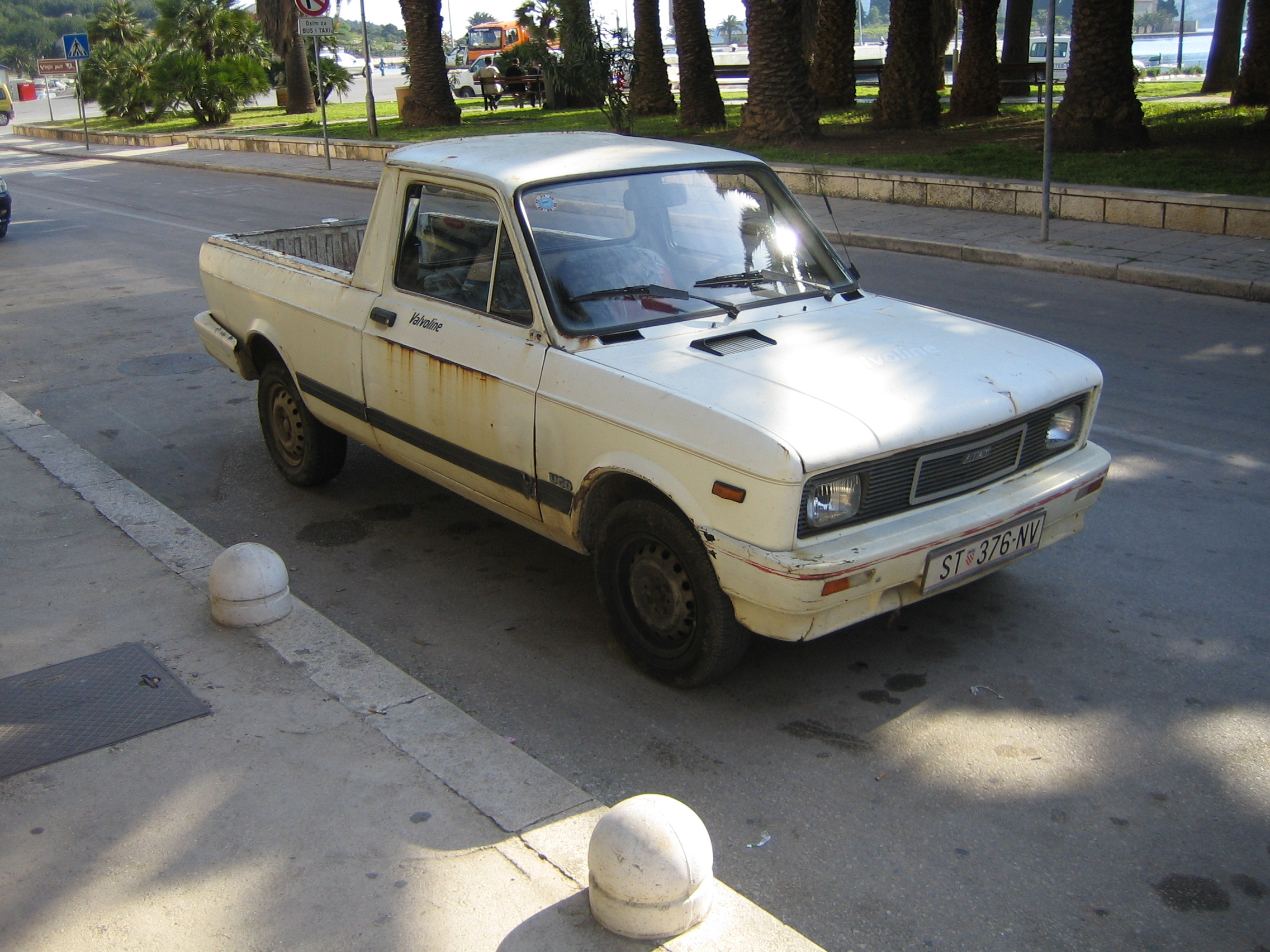 Zastava Yugo Pick Up, 2007-04-15